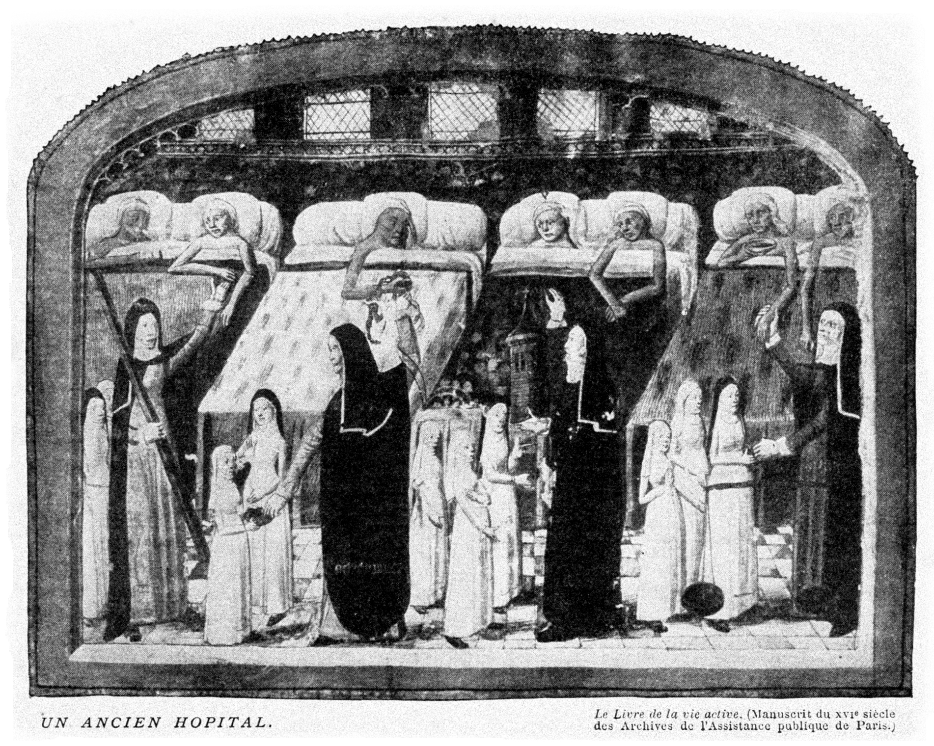 Ancien hopital. Livre de la vie active (Manuscrit du XVI siècle des Archives de l’ Assistance publique de Paris in: Galtier-Boissière (org.). Larousse Medical Illustré, Paris, 1912 (p. 507)